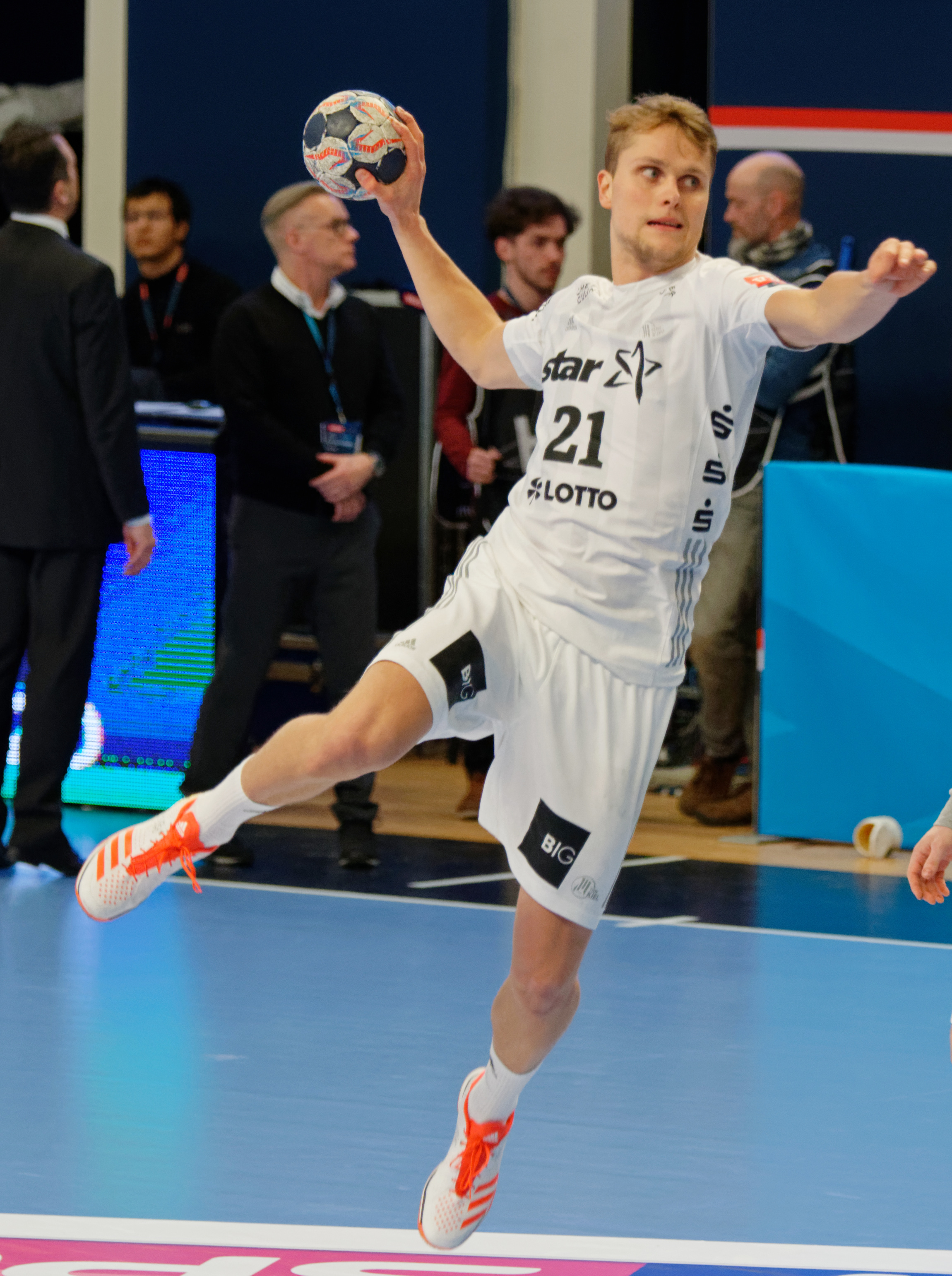 Rencontre de phase de groupe de la ligue des champions 2017/18 entre le PSG et Kiel. A Coubertin, le 4 mars 2018.